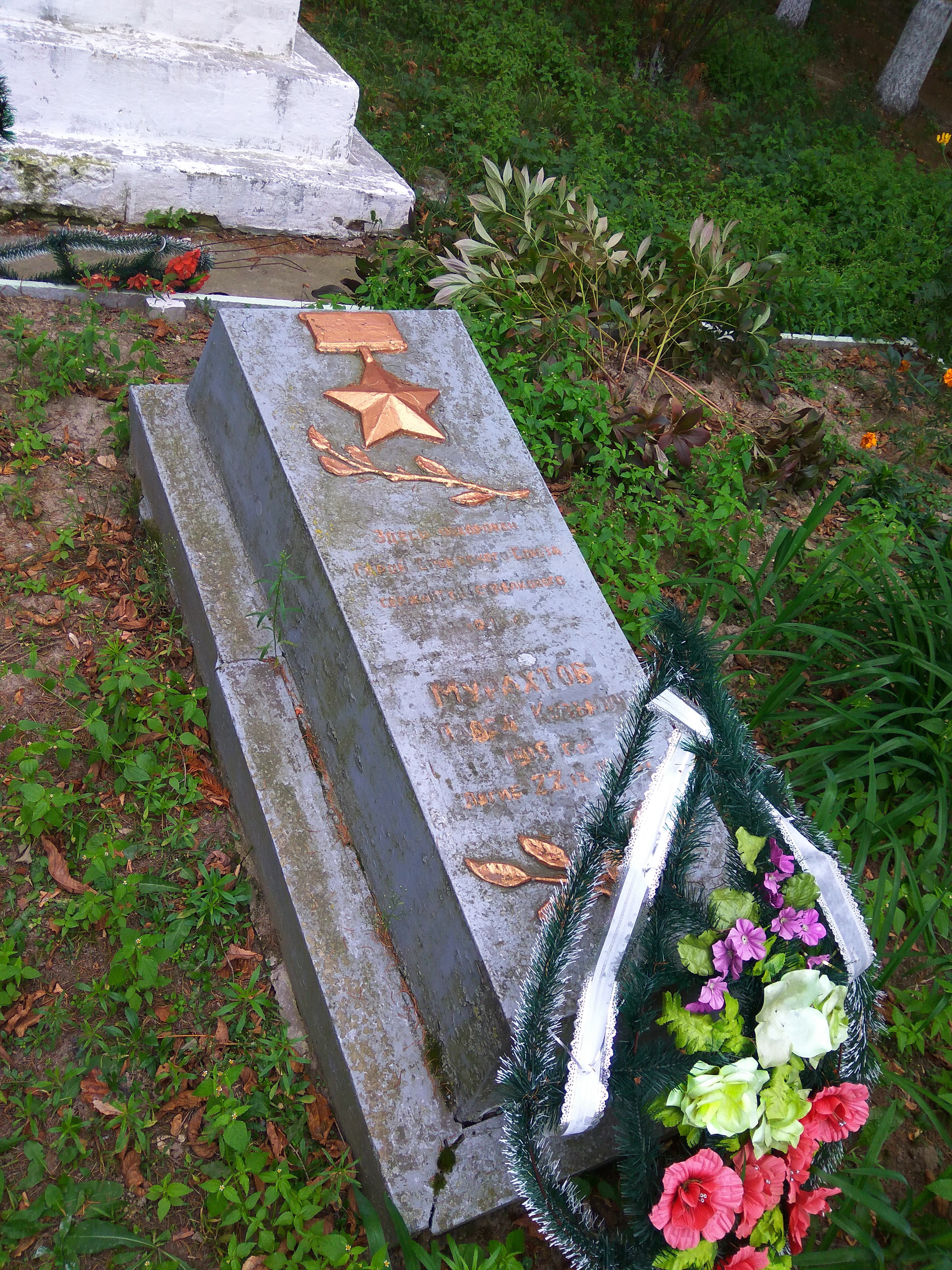 Братська могила 60 радянських воїнів, які загинули у вересні 1943р. Серед похованих Герой Радянського Союзу – П.К. Мурахтов та пам’ятний знак воїнам-односельчанам, які загинули в роки Великої Вітчизняної війни 1941-1945рр., с. Андріївка, вул. Радянська, 171